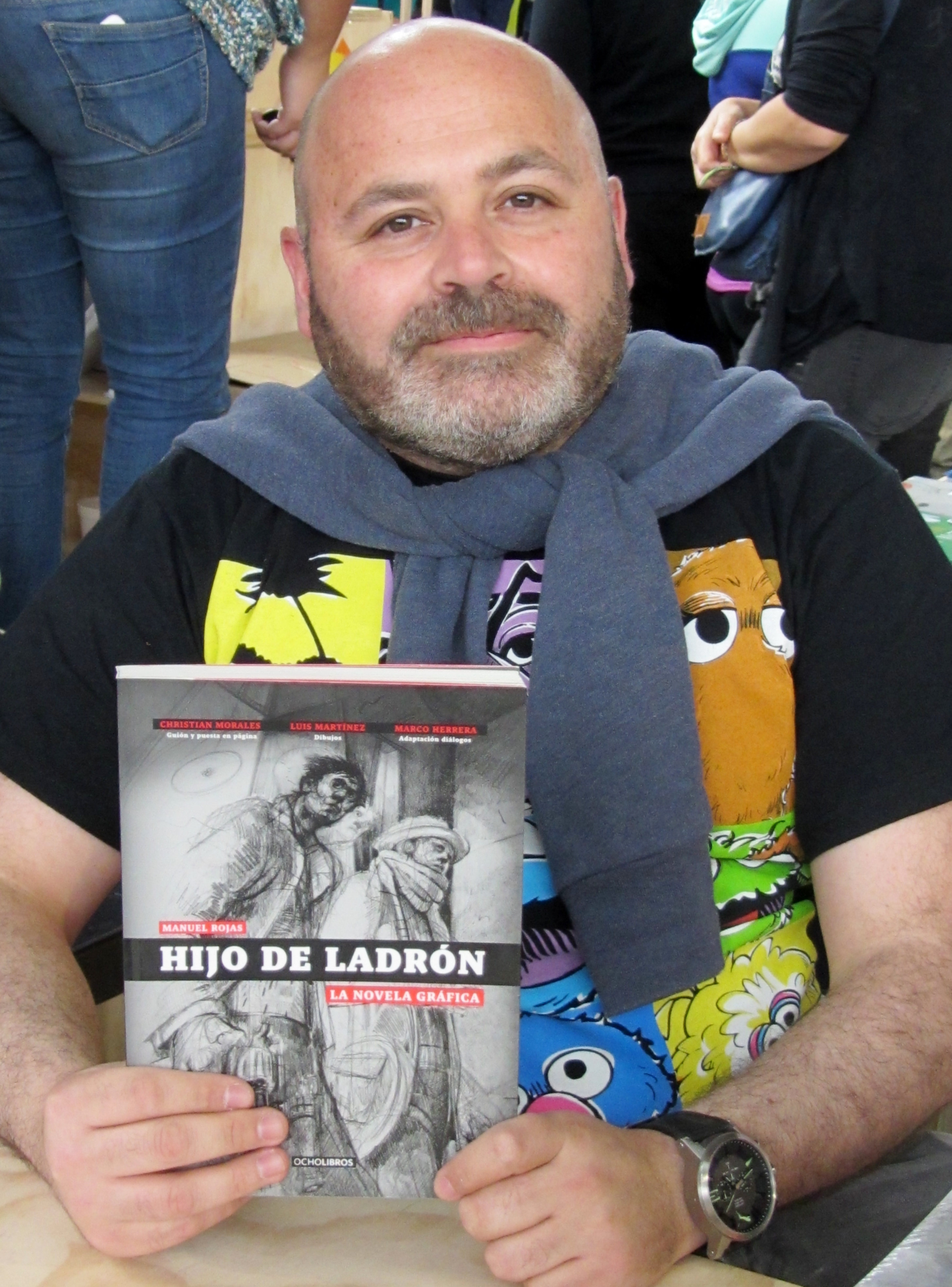 El guionista de cómics Christian Morales firma ejemplares de la novela gráfica Hijo de ladrón basada en la obra homónima del escritor Manuel Rojas en la Feria Internacional del Libro de Santiago 2016